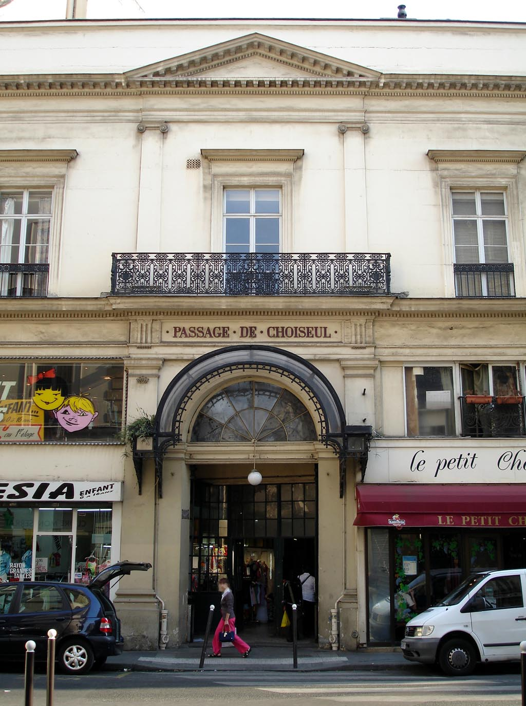 Le passage de Choiseul à Paris (France)